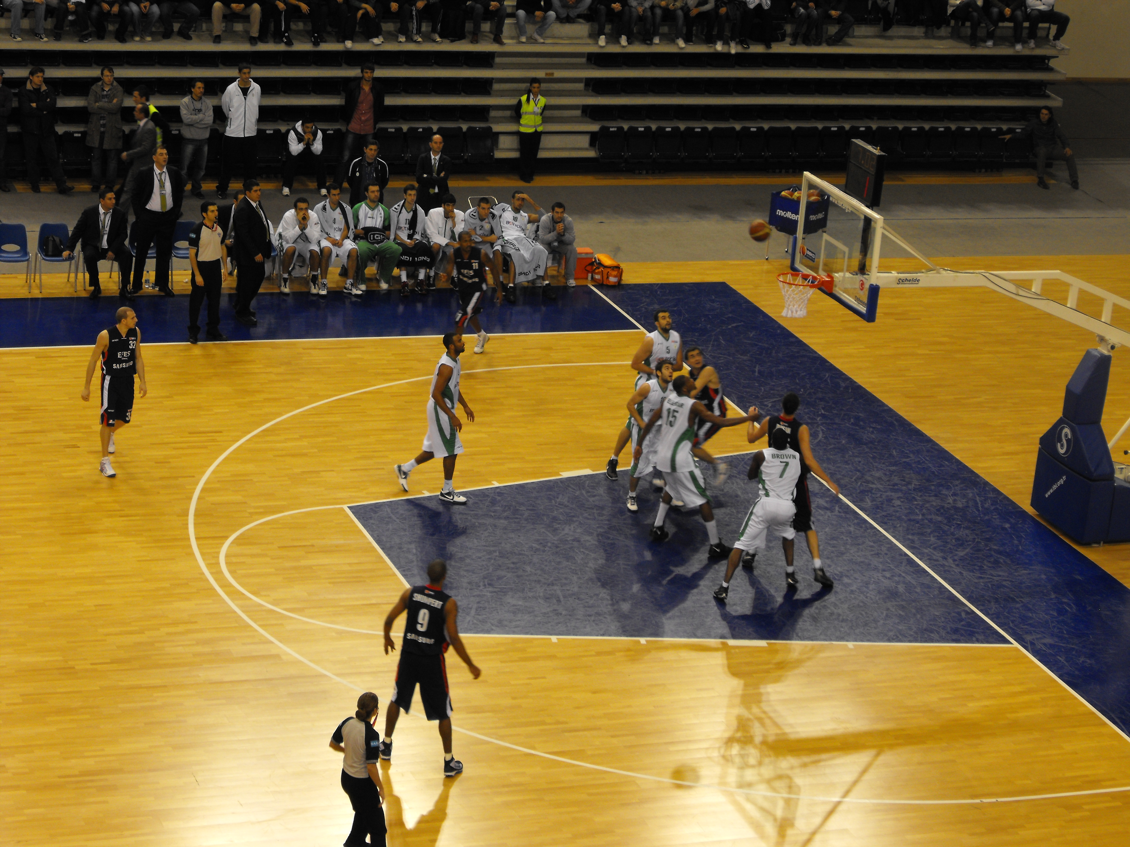 Bornova Belediye-Efes Pilsen maçı Efes atağı